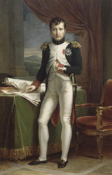 Portrait de Napoléon Ier en uniforme de colonel des grenadiers à pied de la Garde